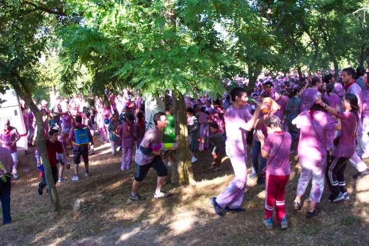 Batalla del Vino de Haro Batalla del Vino celebrada en Haro (La Rioja (España)) en la zona de los Riscos de Bilibio el 29 de junio